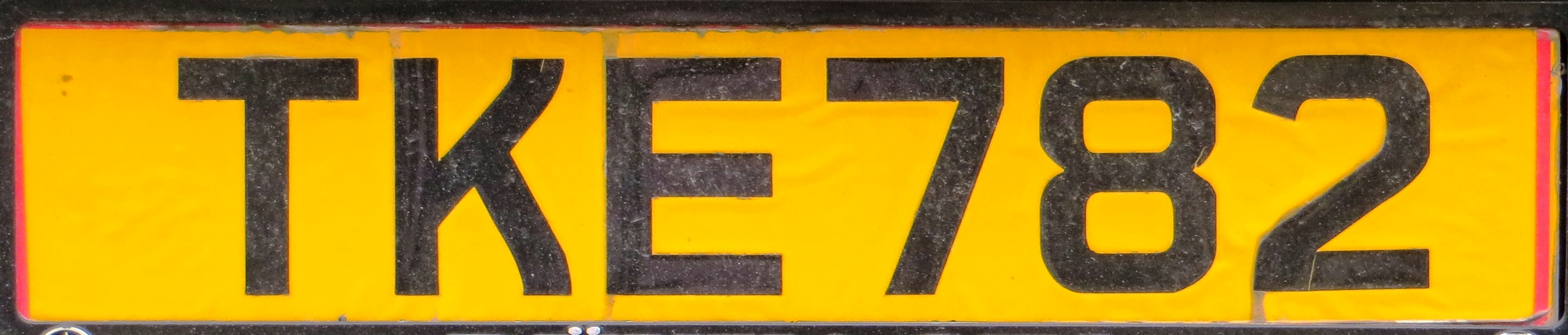 Taxi kentekenplaat Noord Cyprus achter